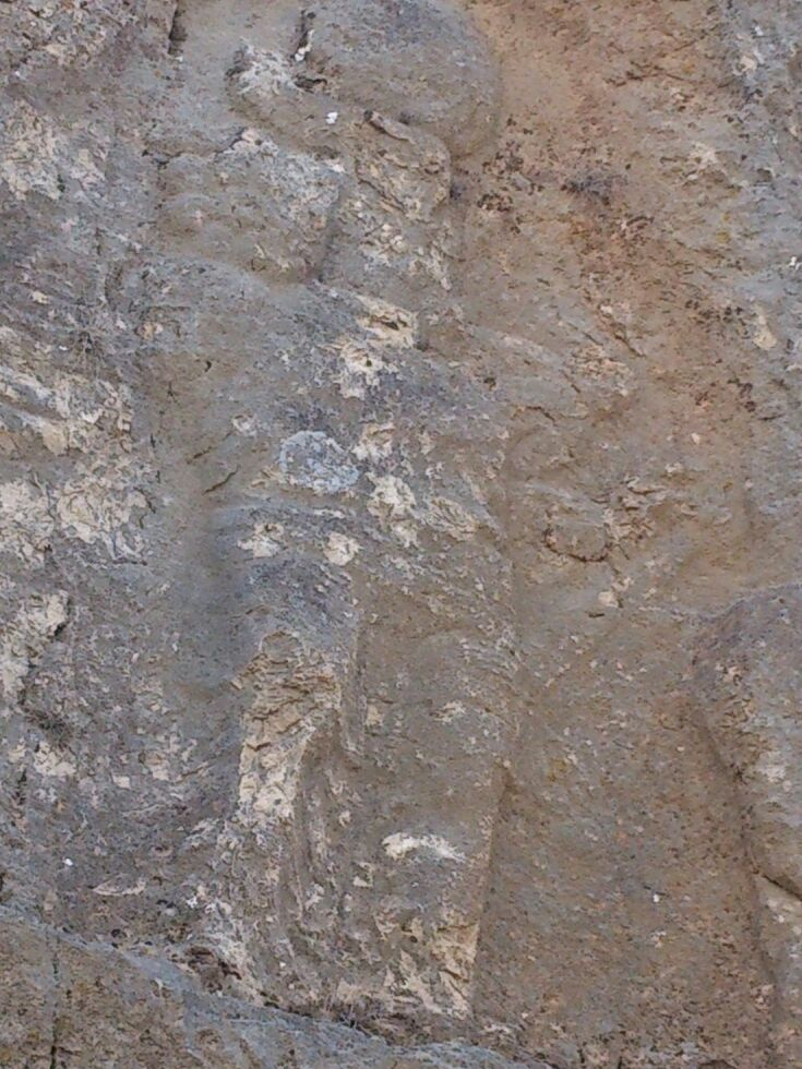 نقش برجسته بهرام دوم.گویم